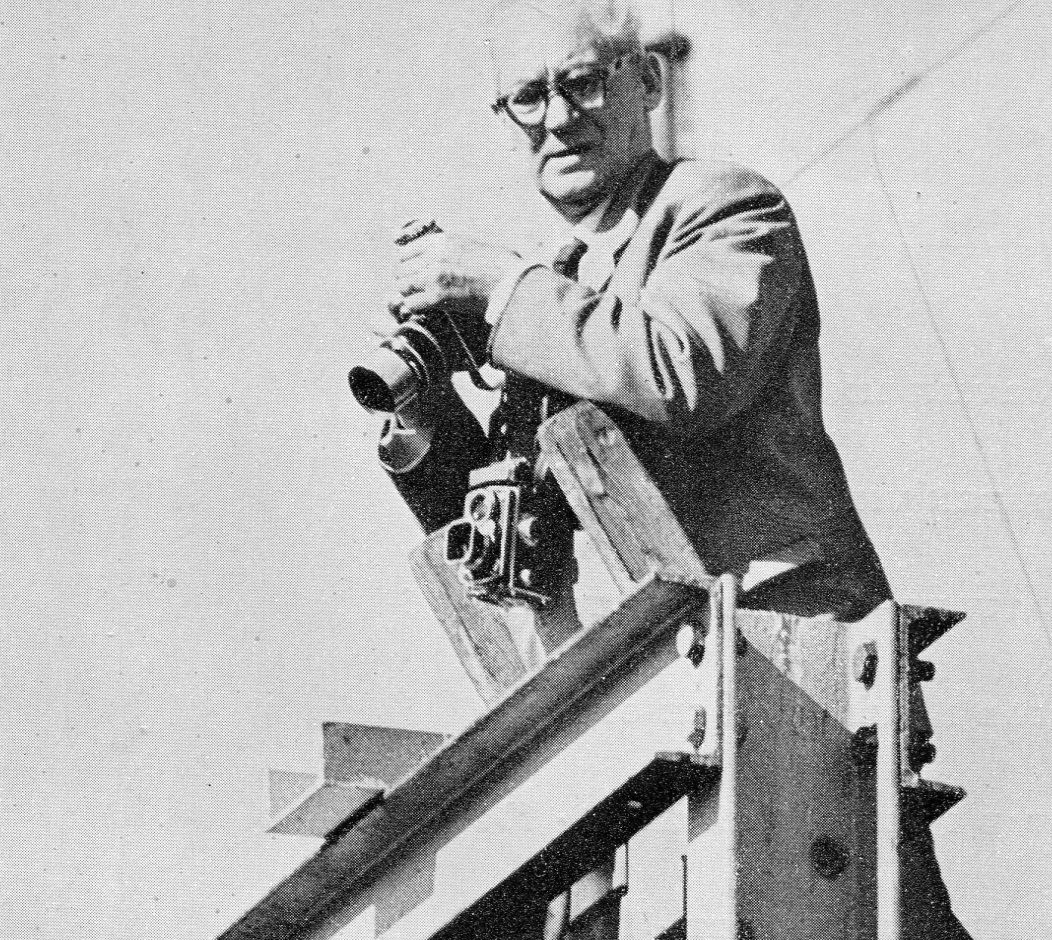 Victor Malmström 1961